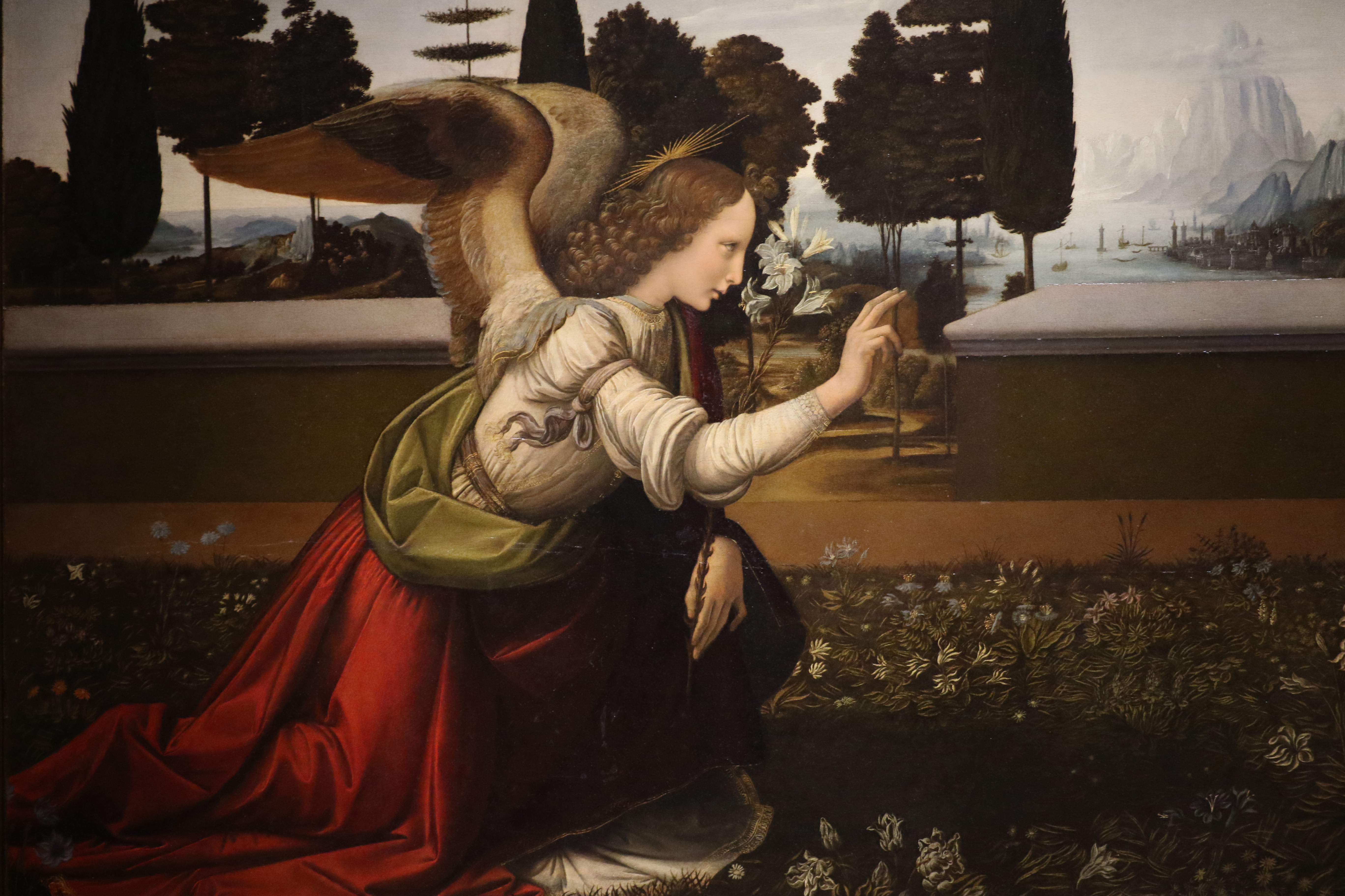 Leonardo da Vinci (1452-1519) Annunciazione (1472-1475 circa) olio e tempera su tavola - dimensioni 98×217 cm - Galleria degli Uffizi, Firenze